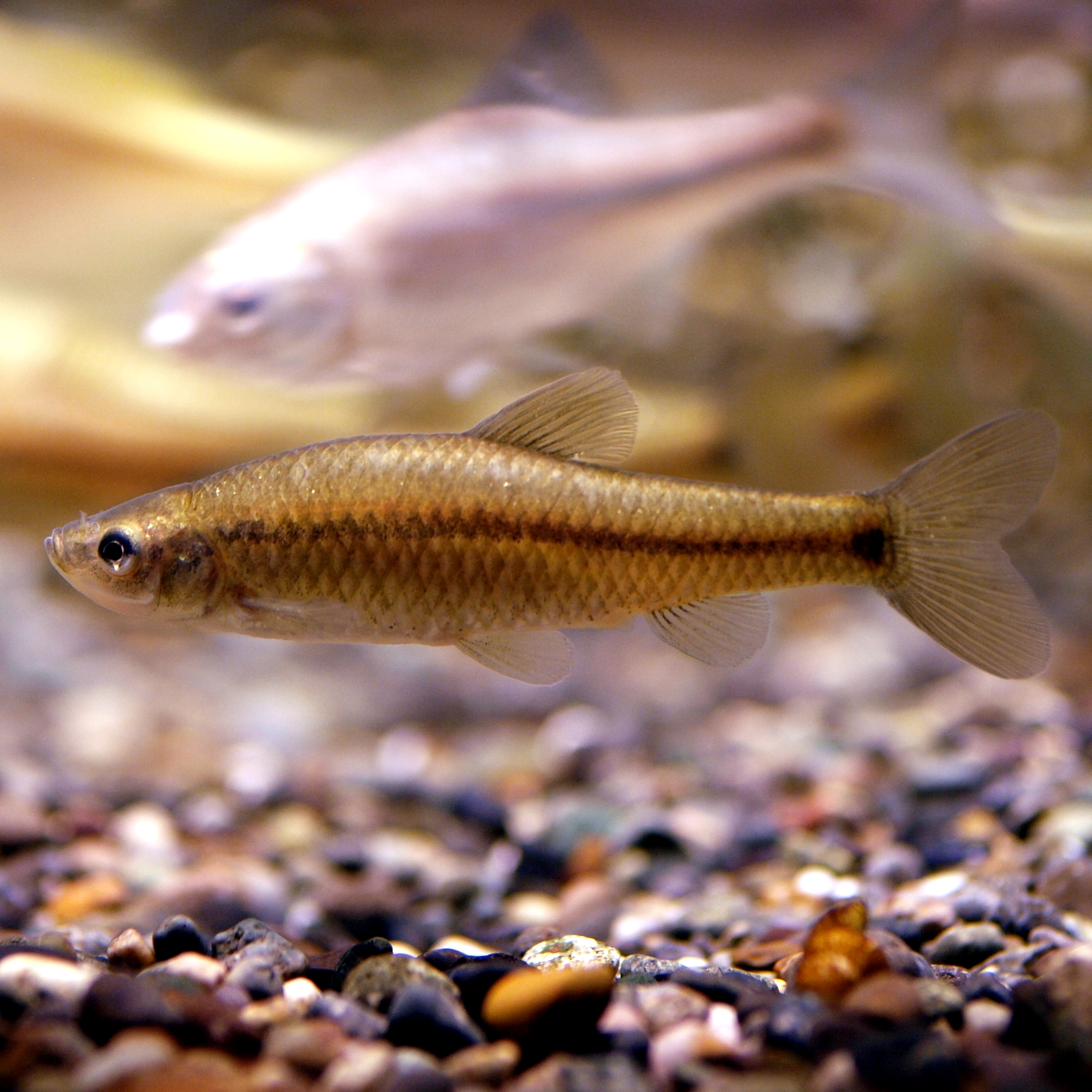 シナイモツゴ